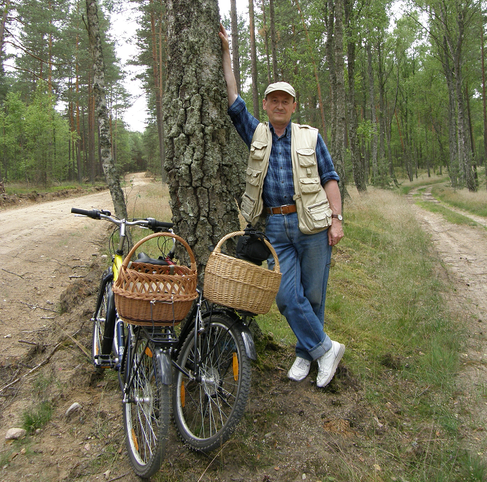 Jan Burnewicz (ur. 12 czerwca 1947 w Zabrodziu), profesor zwyczajny Uniwersytetu Gdańskiego. Fotografia ze zbiorów własnych Jana Burnewicza (2008).